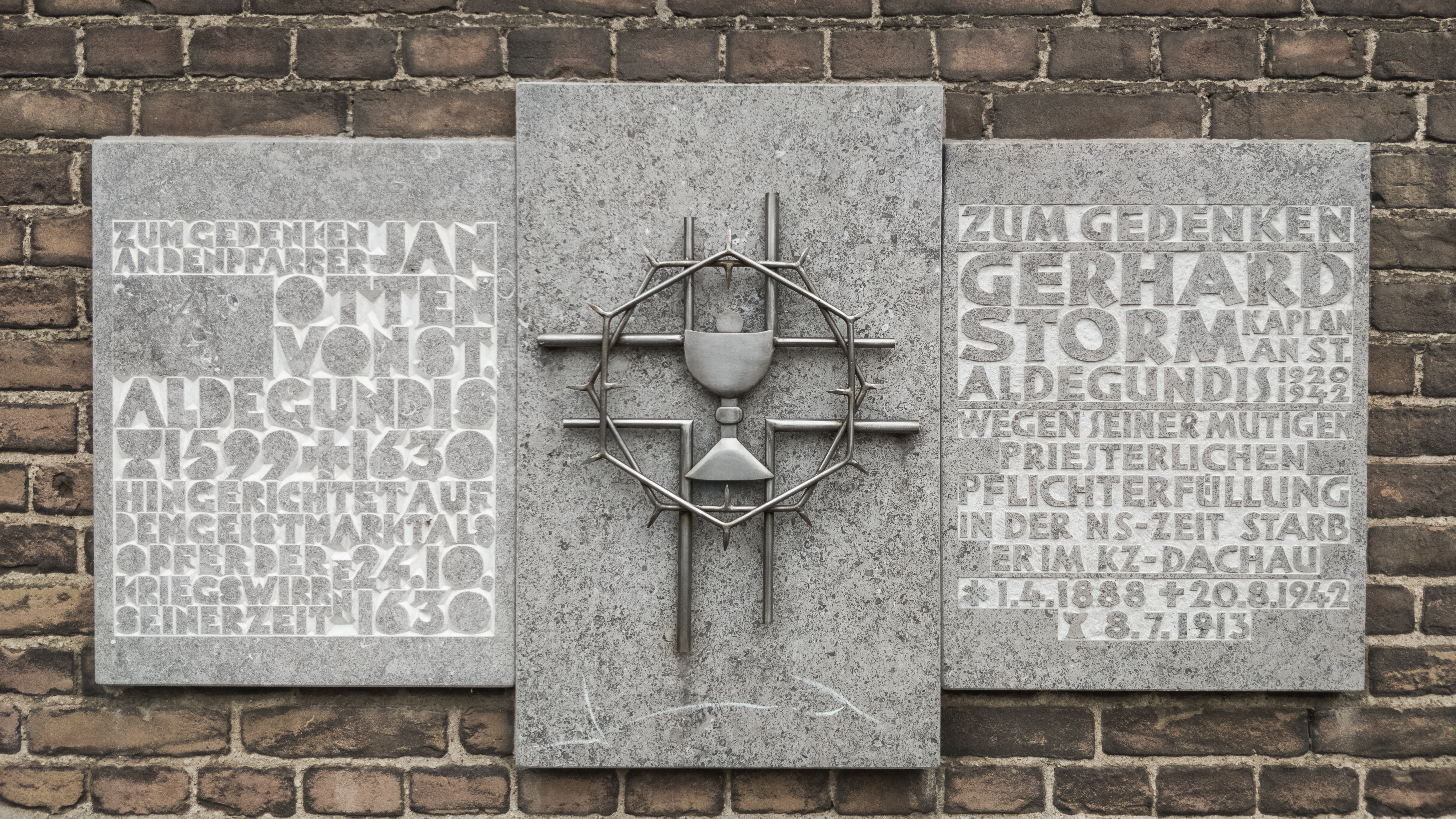 Gedenktafel für den Pfarrer Jan Otten und den Kaplan Gerhard Storm, Aldegundiskirche Emmerich am Rhein Text left: Zum Gedenken an den Pfarrer Jan Otten von St. Aldegundis [Ordination] 1599 † 1630 Hingerichtet auf dem Geistmarkt als Opfer der Kriegswirren seiner Zeit 24.10.1630 Text right: Zum Gedenken Gerhard Storm Kaplan an St. Aldegundis 1920-1942 Wegen seiner mutigen priesterlichen Pflichterfüllung in der NS-Zeit starb er im KZ-Dachau * 1.4.1888 † 20.8.1942 [Ordination] 8.7.1913